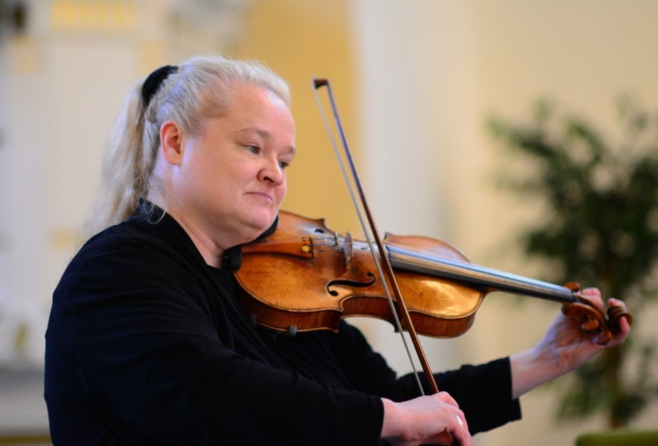 Sonja Korkeala beim Kimito Island Music Festival 2015